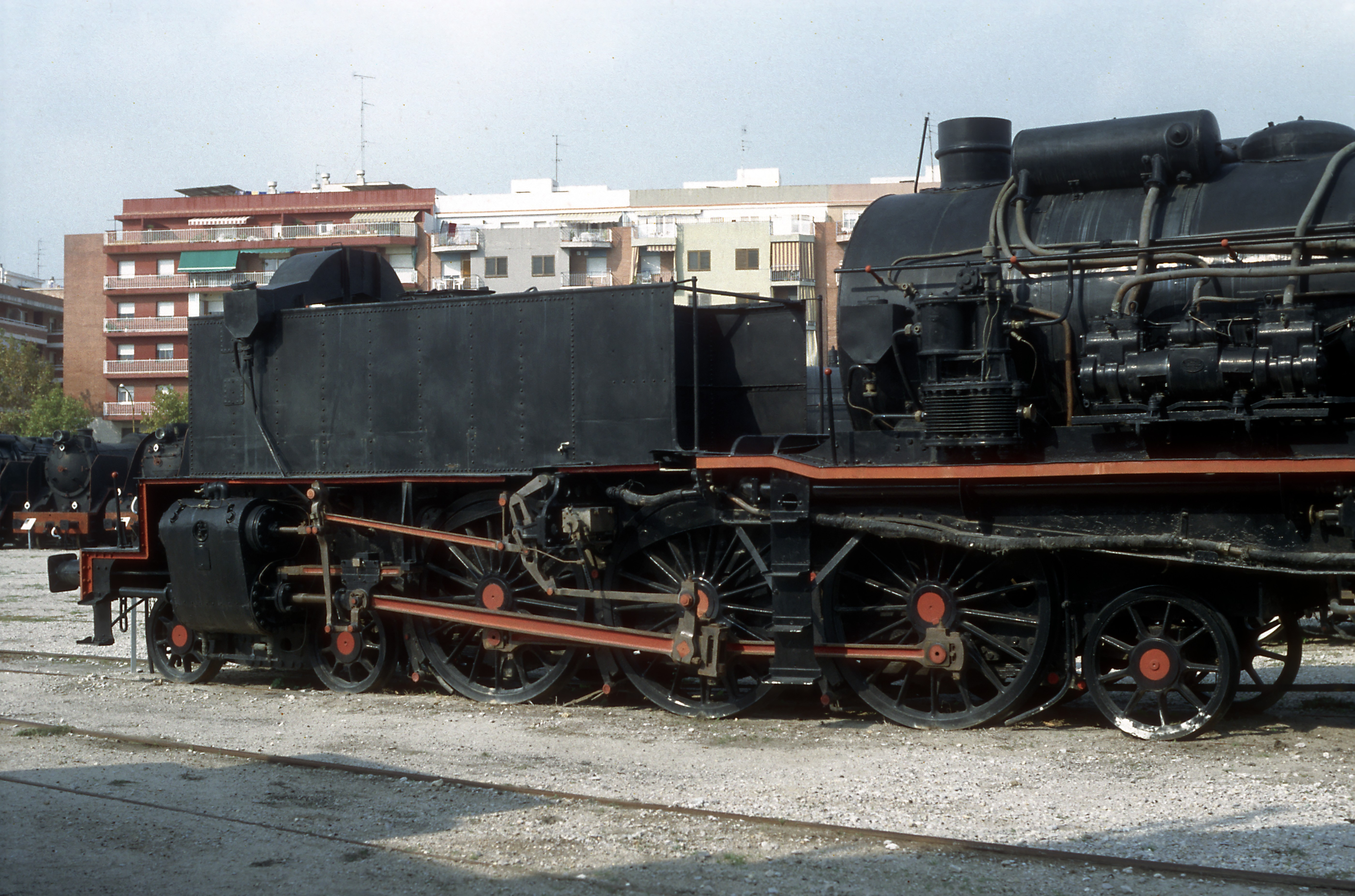 Garrat-Gelenklokomotiven sind in Europa sehr selten. Die 462-F-0401, eine Personenzuglok mit 1750mm Kuppelraddurchmesser, ist die letzte erhaltene in Spanien.Vorderes Triebwerk mit Wasserkasten, Seitenansicht.